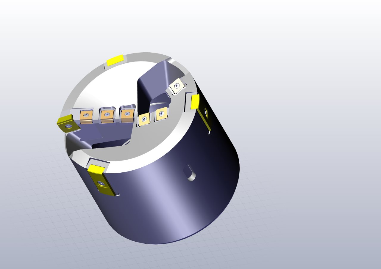 BTA-Tiefbohrkopf mit geteilter Schneide